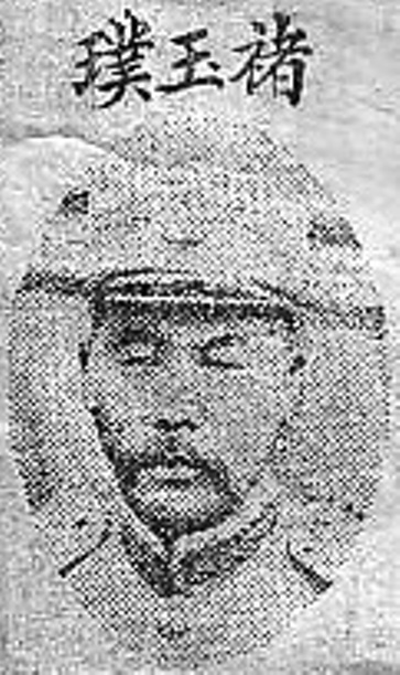 《全序民国时宪书》上刊登的褚玉璞照片